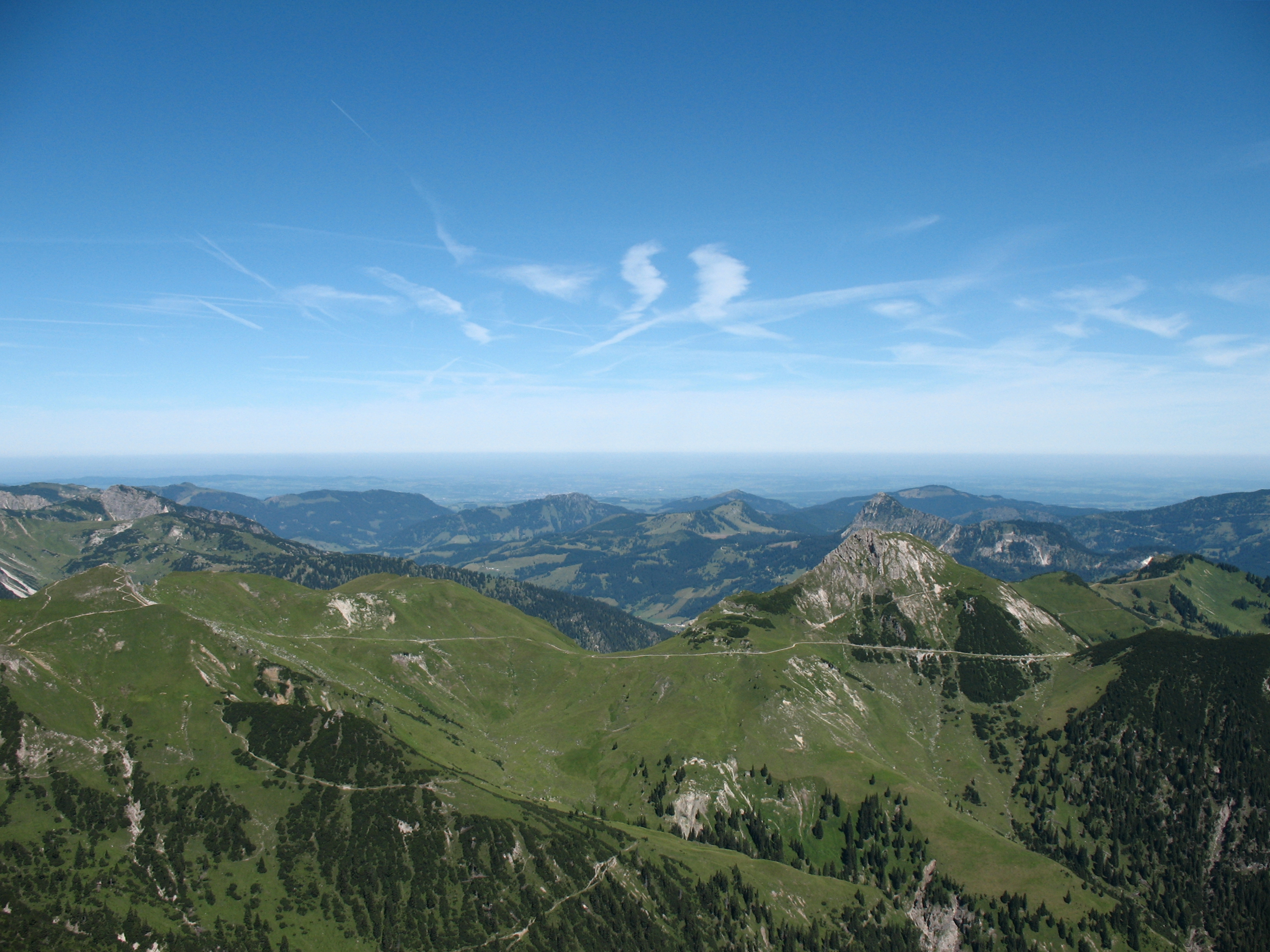 Blick von der Leilachspitze (2274 m) auf die Schochenspitze (2069 m) und die Sulzspitze (2084 m).